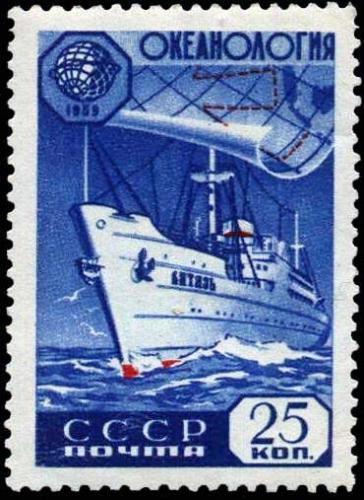 Океанология. Советское научно-исследовательское судно «Витязь», на карте показан его курс в Индийском океане. Номер по каталогу ЦФА — 2353.